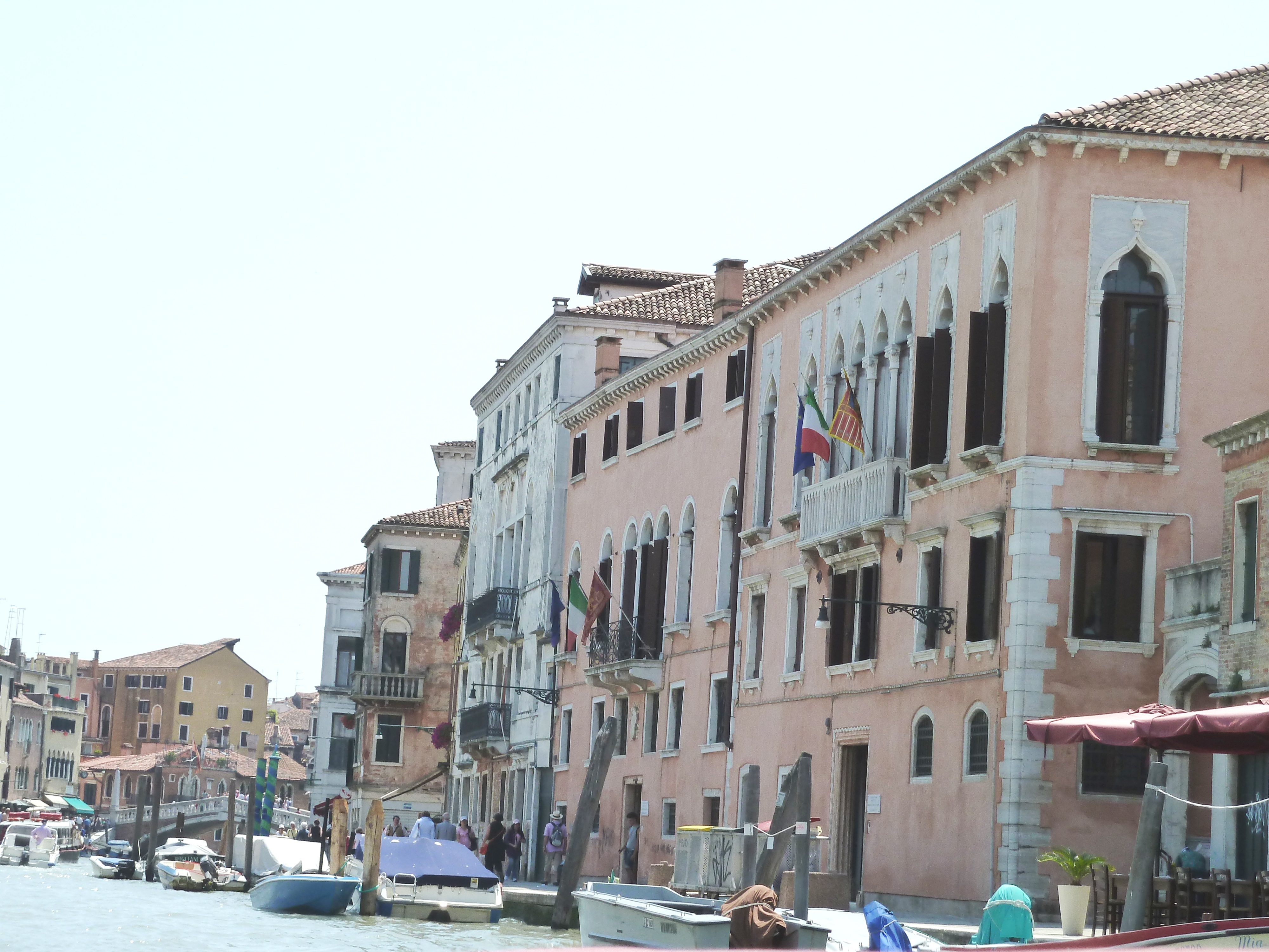 Palazzo Testa (Venice)